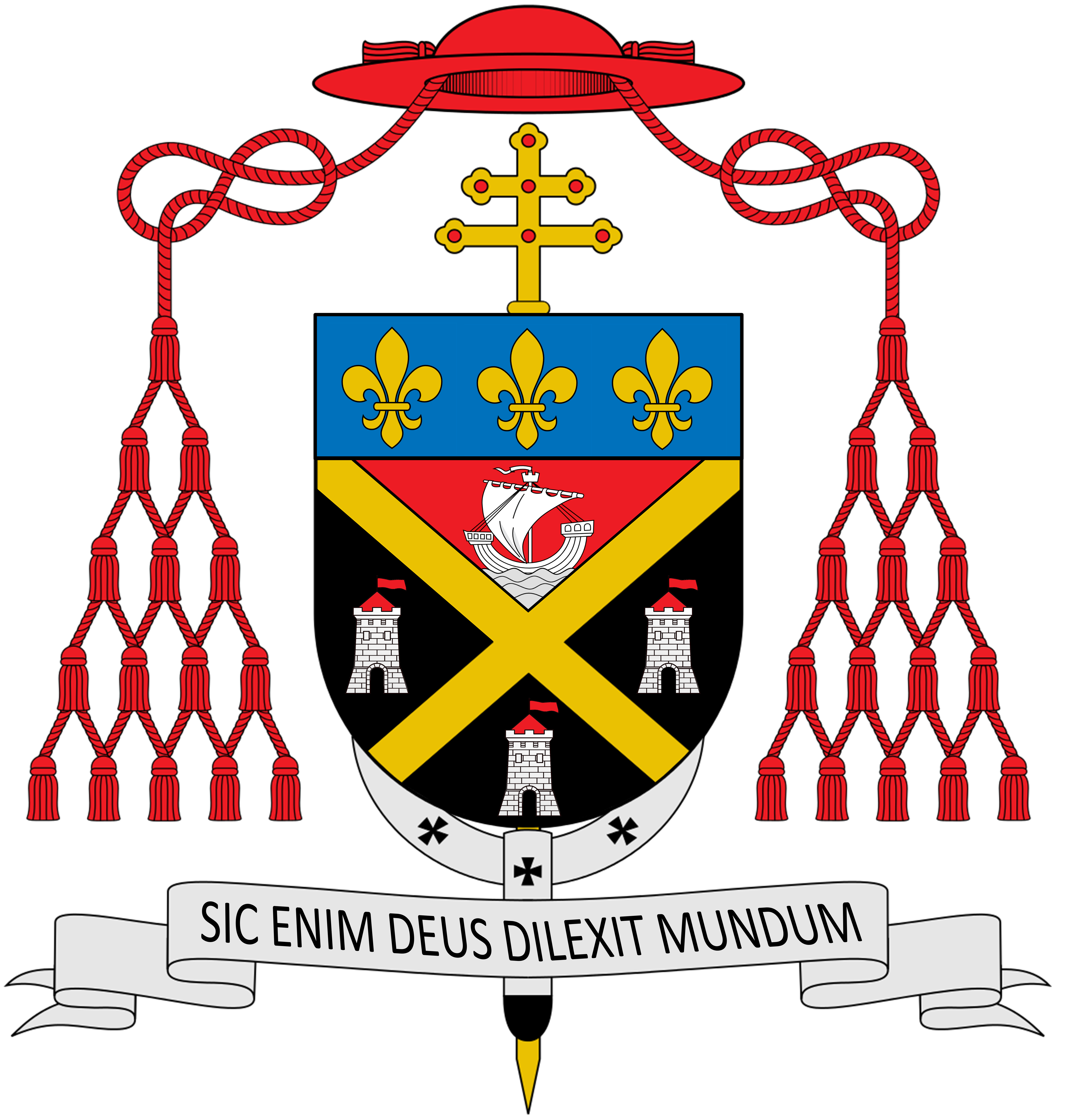 Bischofswappen